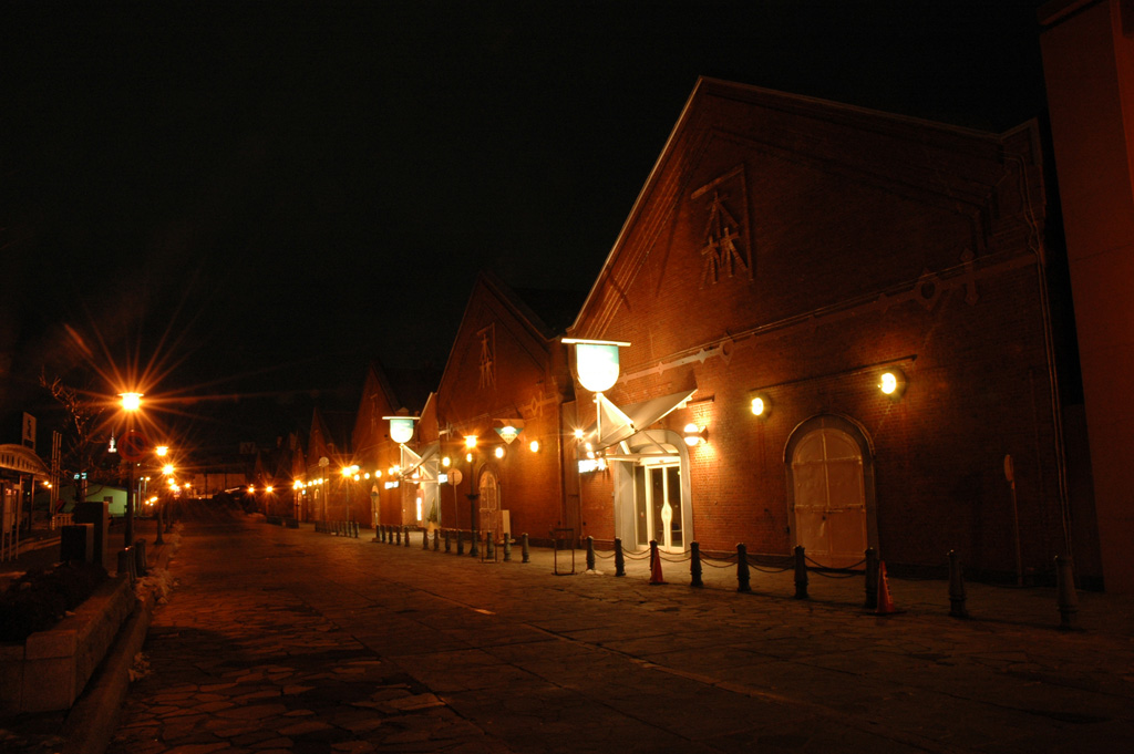 北海道函館市の観光スポット・金森赤レンガ倉庫です。